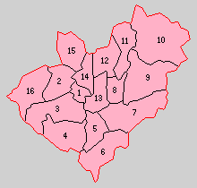 宮城県登米郡の町村。